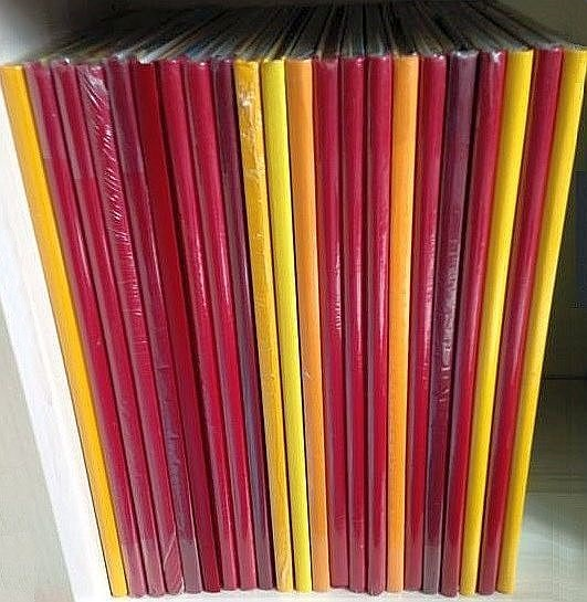 Les fac-similés couleurs des aventures de Tintin.